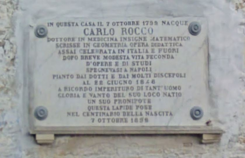 Fotografia della lapide dedicata alla memoria di Carlo Rocco, sita in Bovino nella via omonima